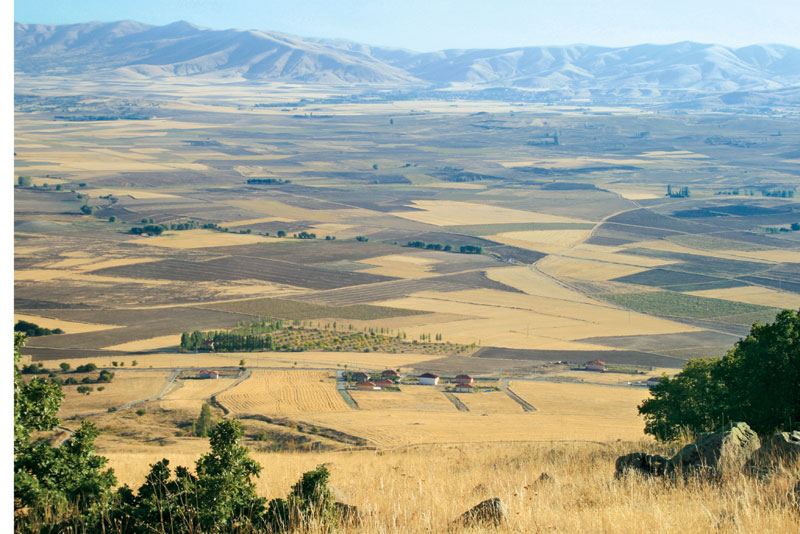 İsahocalı, Kaman